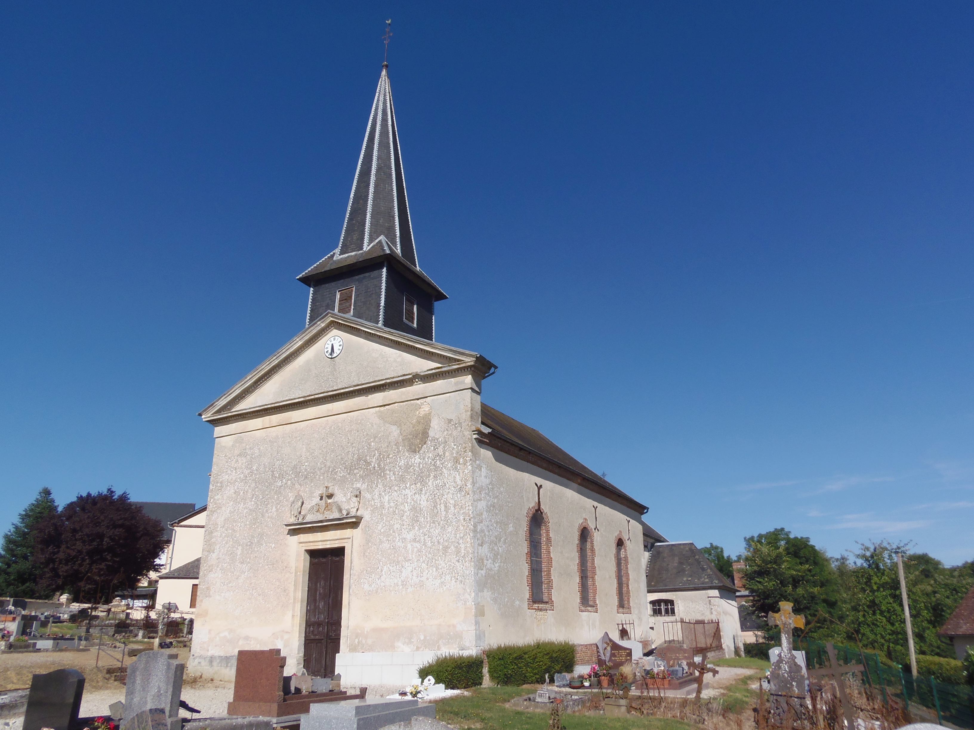 Écorches (Normandie, France). L'église Saint-Agnan.